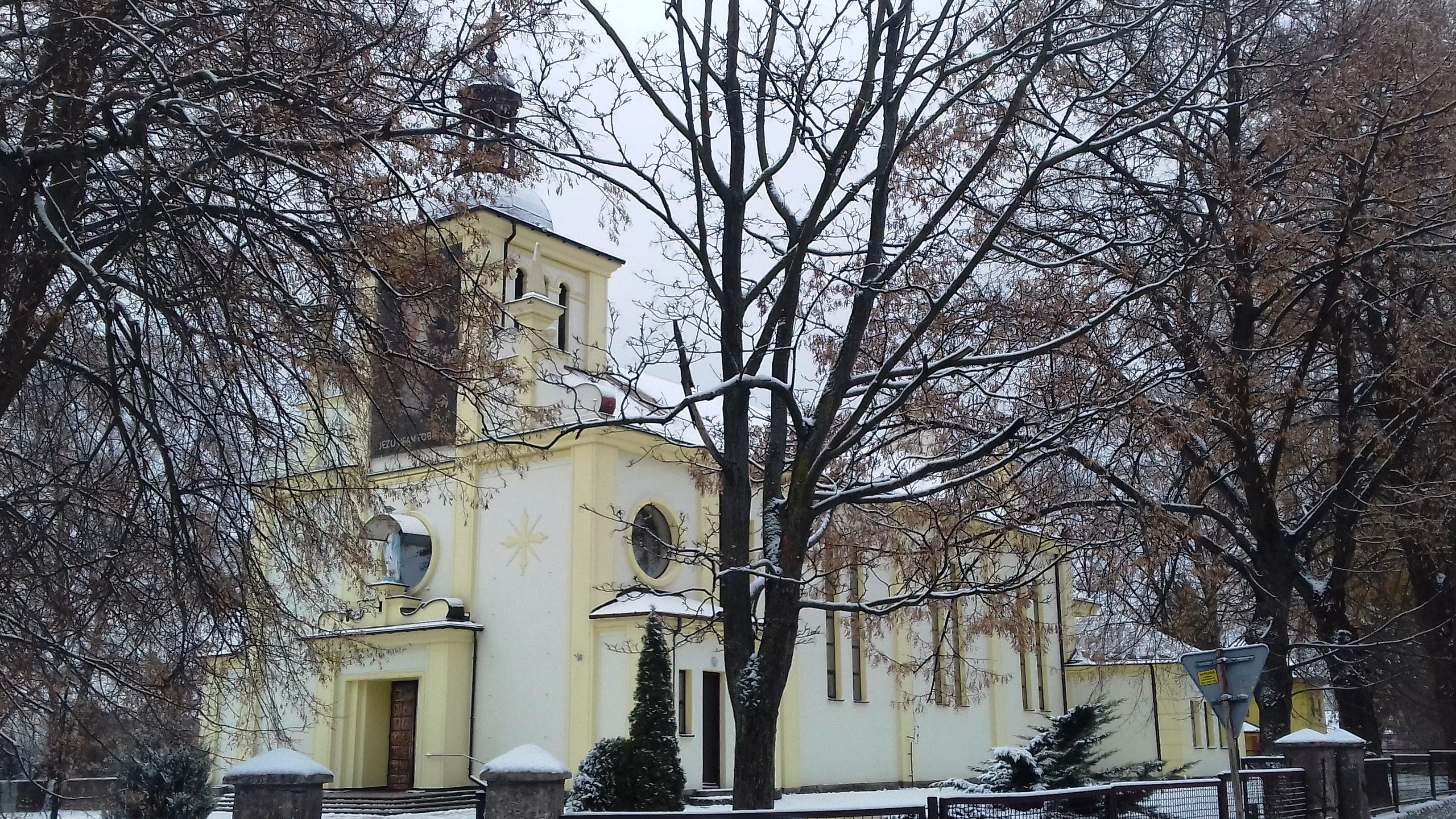 Kazuń Polski (gm. Czosnów, pow. Nowy Dwór Mazowiecki) - kościół Matki Bożej Szkaplerznej